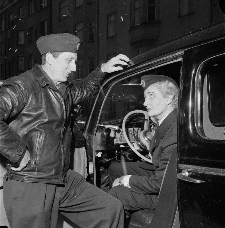 Den första kvinnliga taxichauffören i stockholmstrafiken, Maud Hansson-Fagerberg, blir avlöst av Sven Jansson efter debuten. (Tre dagar senare började ytterligare två kvinnliga taxichaufförer.(Stockholmskällan Fotonummer SvD 36112)